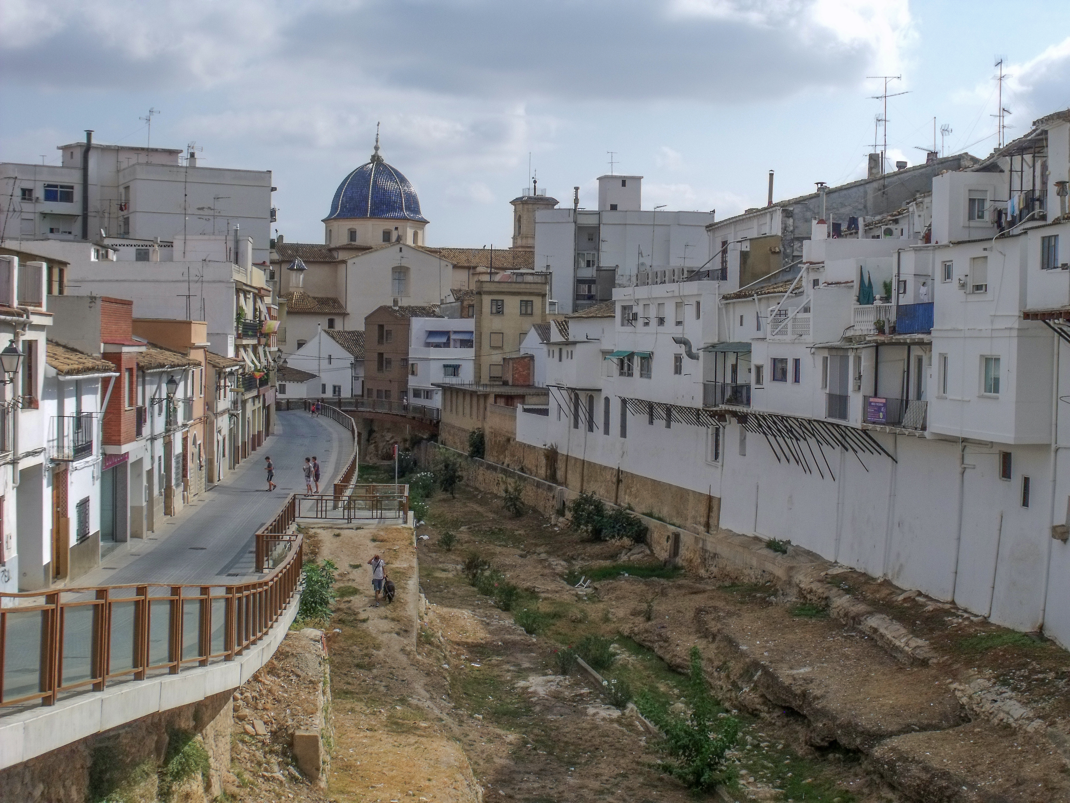 Barranco de Chiva (Valencia).